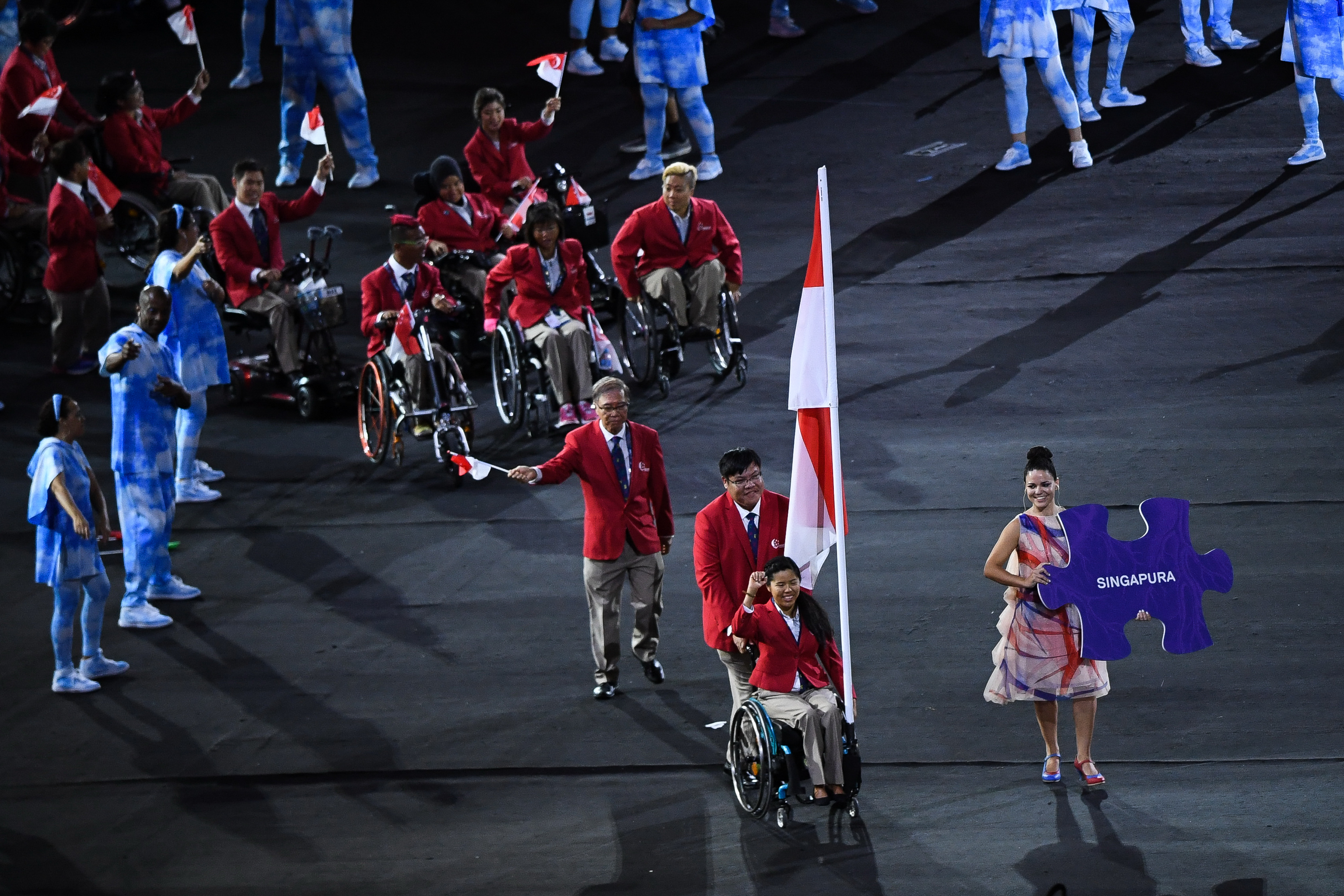 Rio de Janeiro - Cerimônia de abertura dos Jogos Paralmpicos Rio 2016 no Estdio do Maracanã (Tomaz Silva/Agência Brasil)